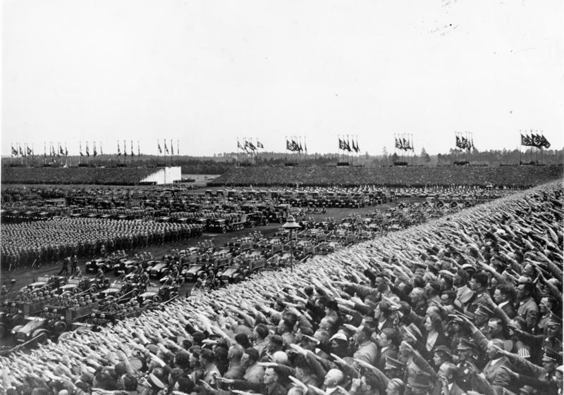 Nürnberg, Reichsparteitag, Wehrmachts-Aufmarsch [Scherl] Reichsparteitag 1936, Der große Aufmarsch der Wehrmacht auf der Zeppelinwiese. 13346-36 ADN-ZB/Archiv Faschistisches Deutschland 1933 - 1945 Reichsparteitag der faschistischen NSDAP in Nürnberg 1936 Der große Aufmarsch der Wehrmacht auf der Zeppelinwiese. 13346-36 [Nürnberg.- Reichsparteitag der NSDAP, "Reichsparteitag der Ehre", Aufmarsch von Fahrzeugen der Wehrmacht, 8.-14. September 1936]